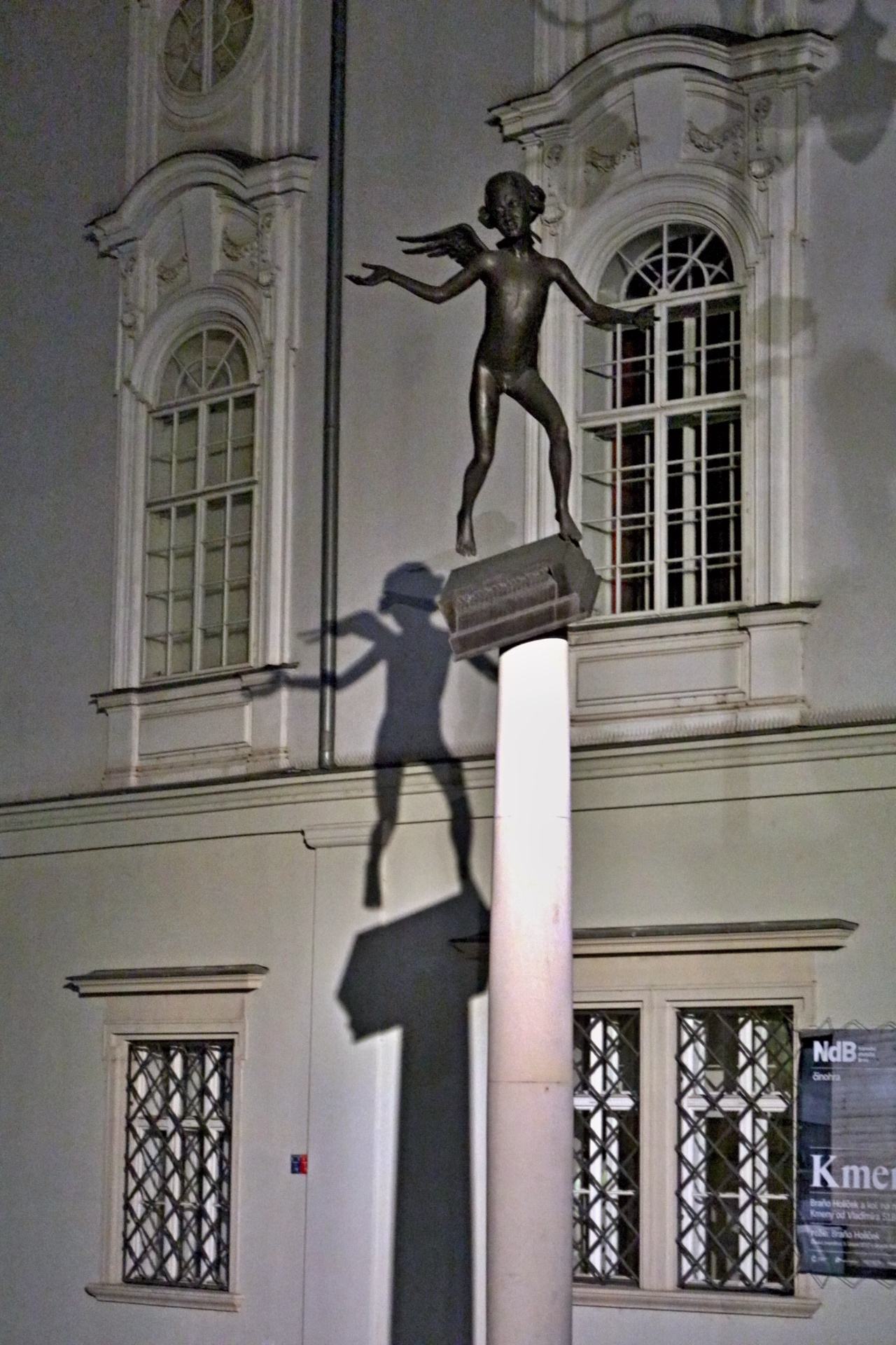 Zelný trh (Brno)